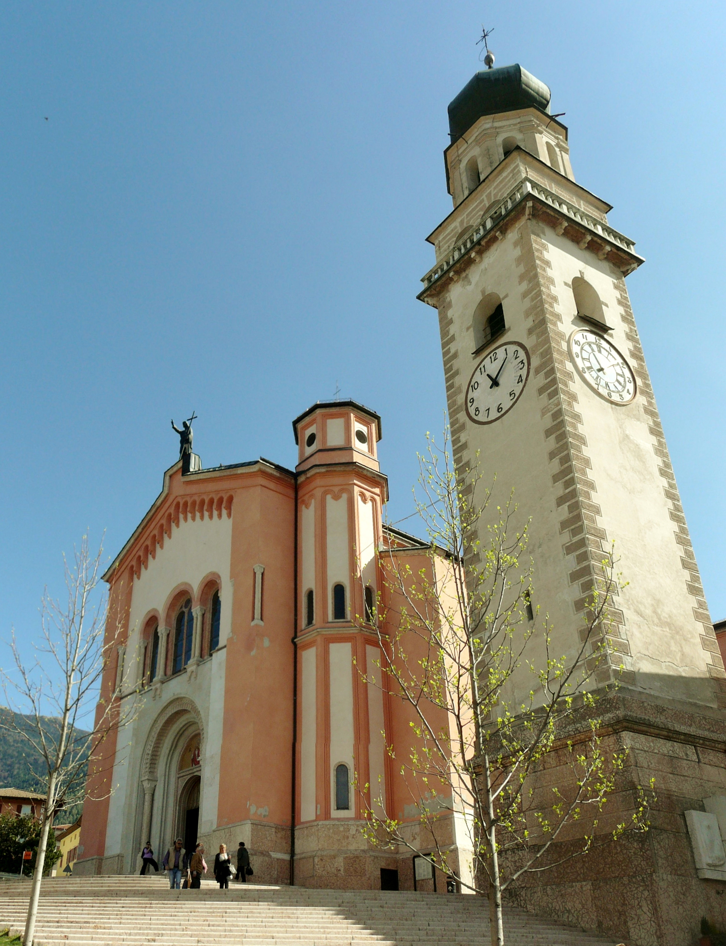 Parrocchia di Levico